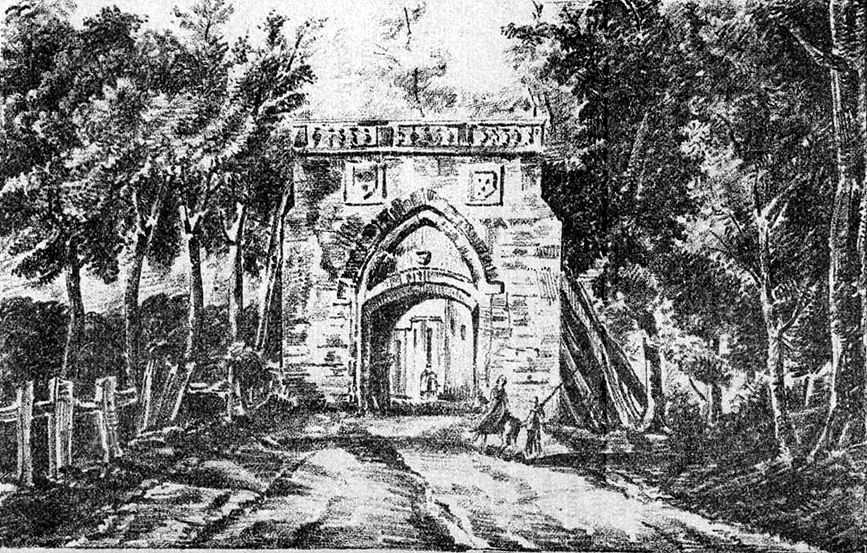 L'ancienne porte Bellon, rue Bellon, au nord-est de la ville.